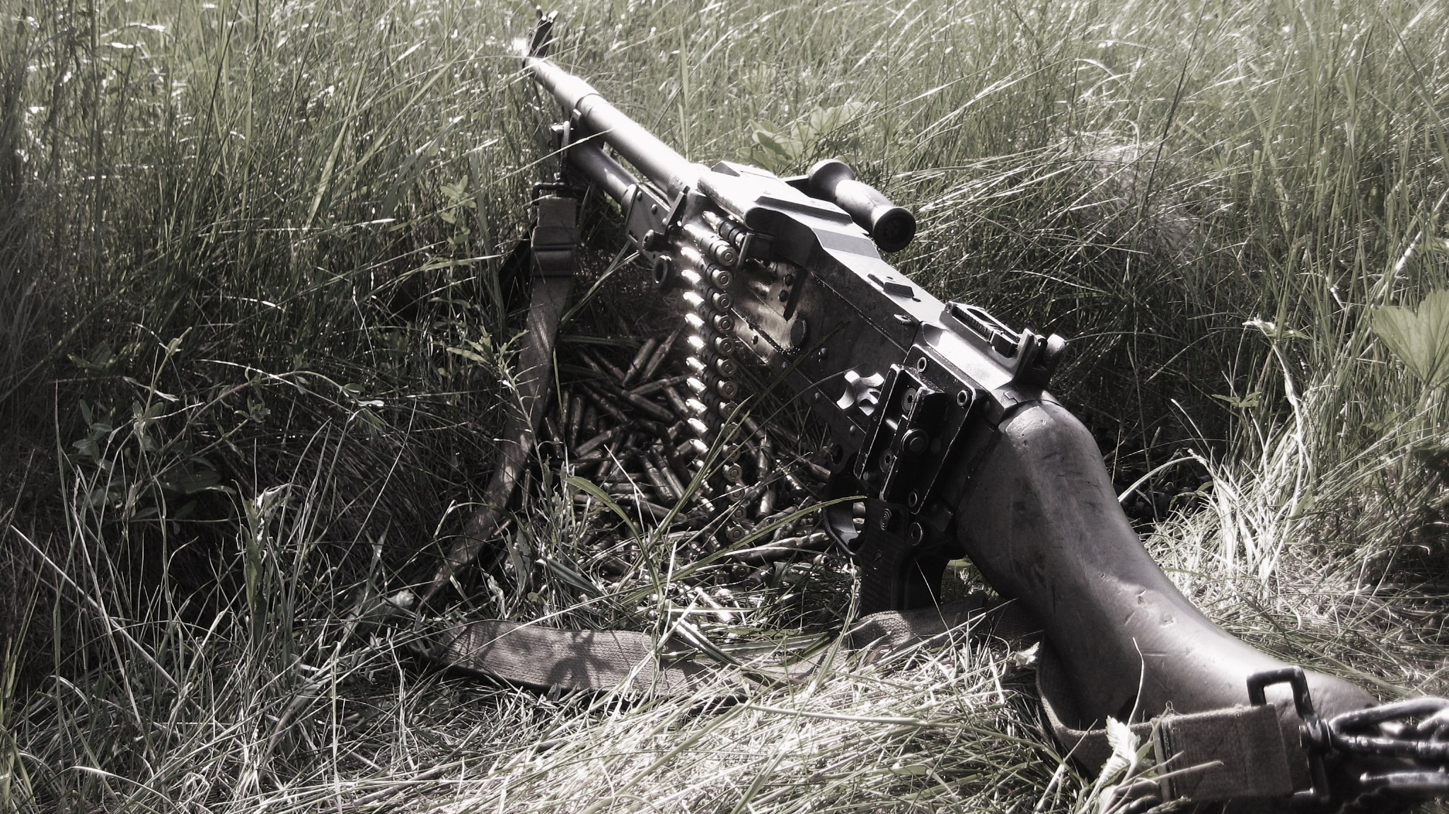 Photo d'une C6 prise dans un champ cet été. Cette arme est chargée avec une bande de balles à blanc et son BFA est fixé au bout du canon.